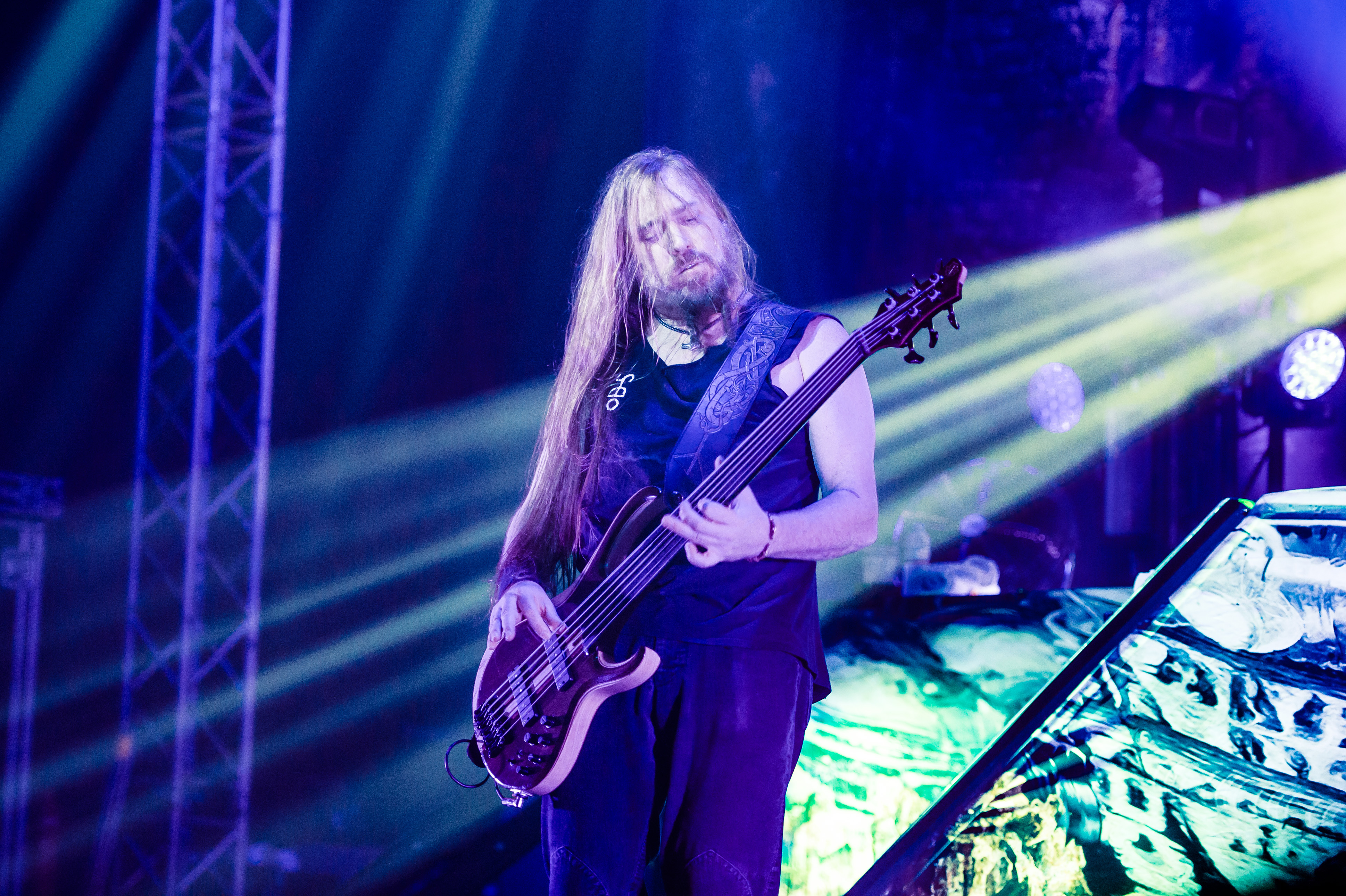 'Ruhrpott Metal Meeting 2017; Turbinenhalle Oberhausen': 'Testament'